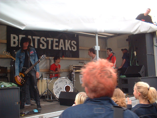 Straßenkonzert der Berlin Band "Beatsteaks" auf einem Lastwagen vor dem Mauerpark, Berlin-Prenzlauer Berg. Juni 2002